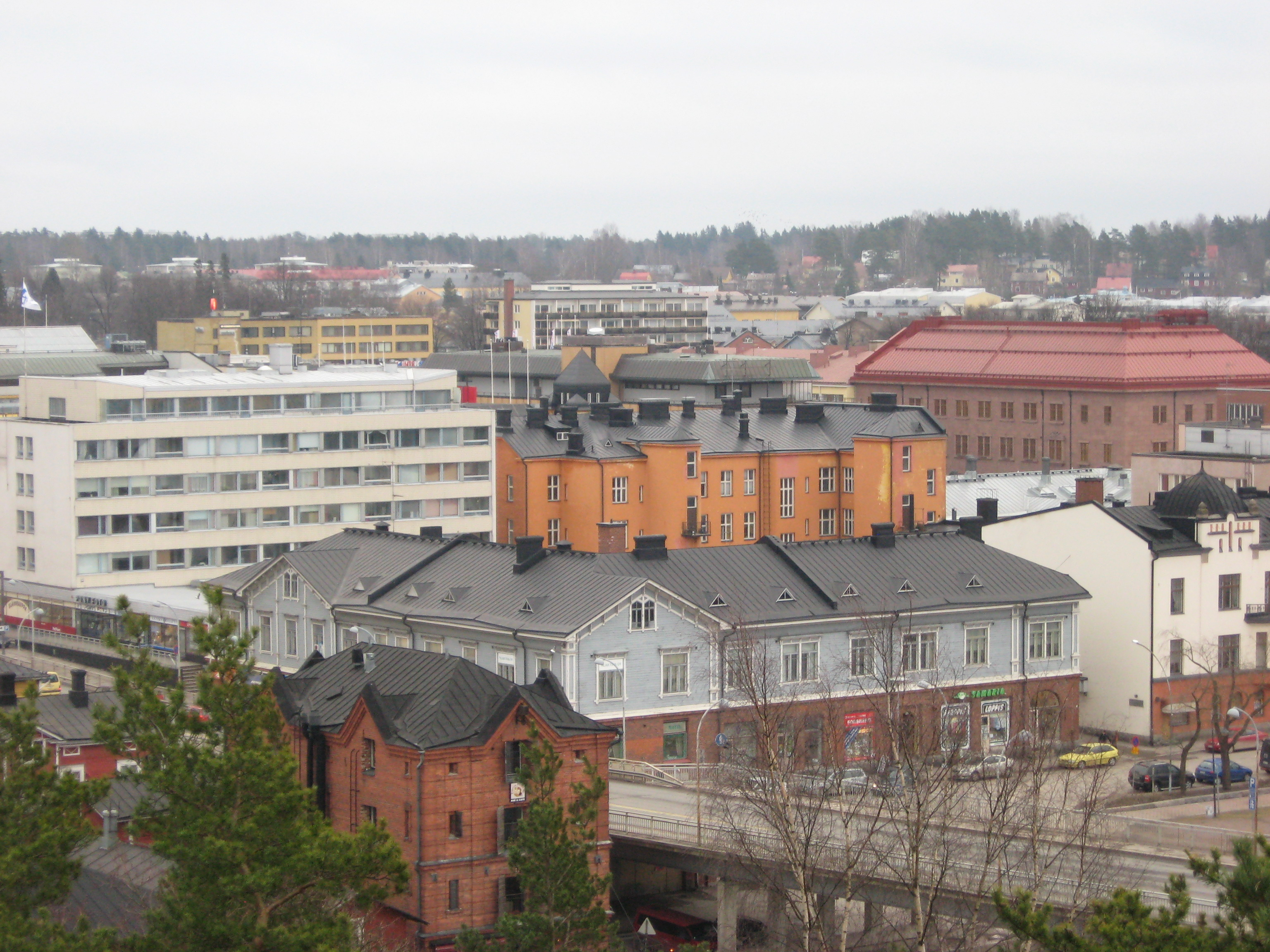 Porvoo city from Näsinmäki